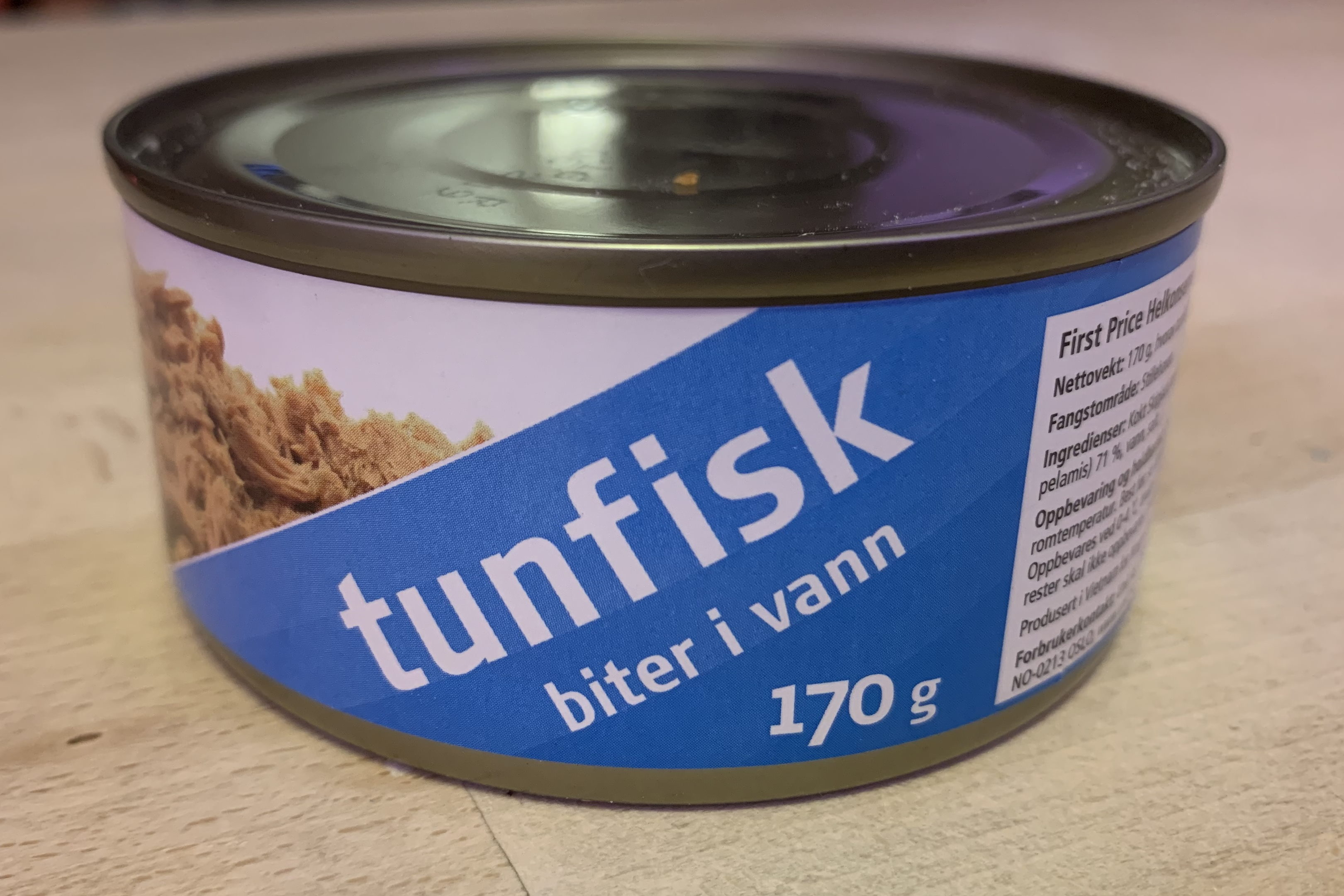 «Tunfisk biter i vann». Et eksempel på særskriving.